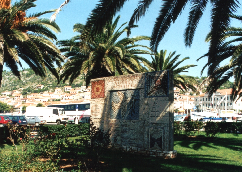 Spomenik na manifestaciju "Prvi međunarodni susret umjetnika - Vela Luka - 1968.", koji se u Veloj Luci održavao od 9. kolovoza do 31. kolovoza. Tema susreta bila je skupni rad na mozaiku, s ciljem izrade većeg broja radova, koji bi nakon realizacije ostali trajno ukrašavati velolučke javne površine.